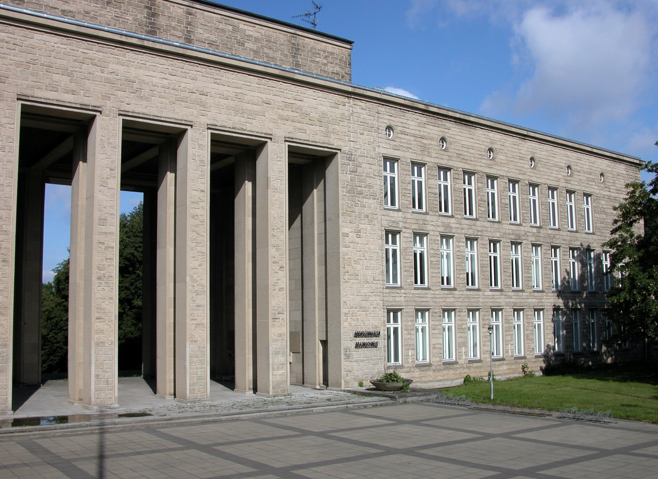 Braunschweig: „Akademie für Jugendführung“, Hauptgebäude, von Südosten gesehen. Brunswick, Germany: “Akademie für Jugendführung”, main building, as seen from the southeast.